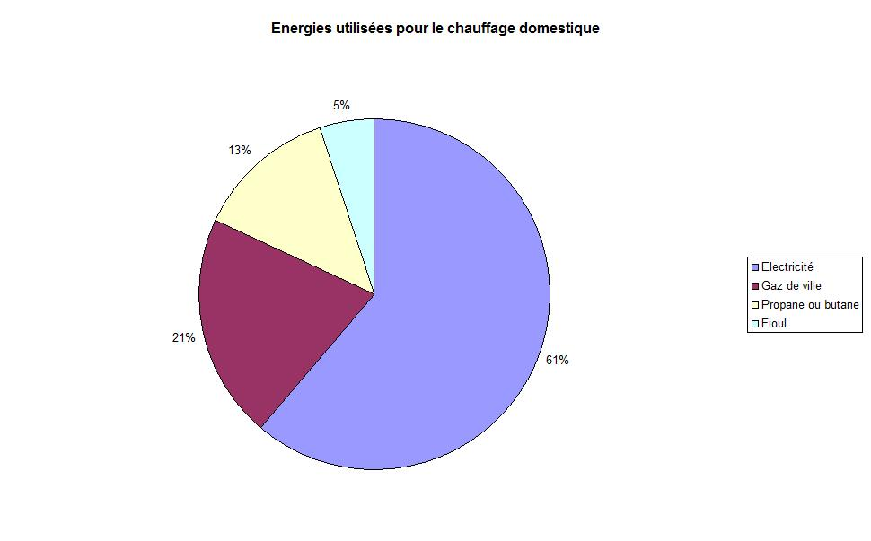 Répartition des sources d'énergies utilisées pour le chauffage domestique à Dudley (Géorgie, Etats-Unis)